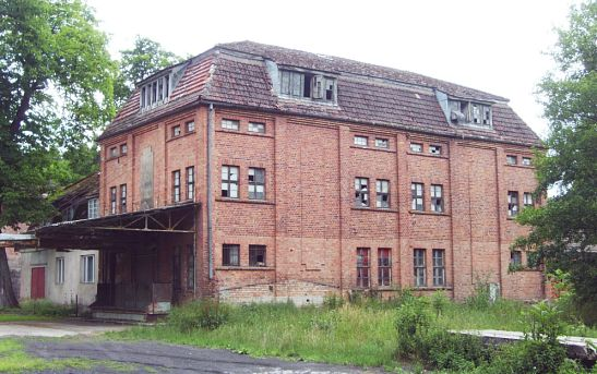 Młyn w Brojcach z przełomu XIX/XX wieku (Polska, woj. zachodniopomorskie, pow. Gryfice).